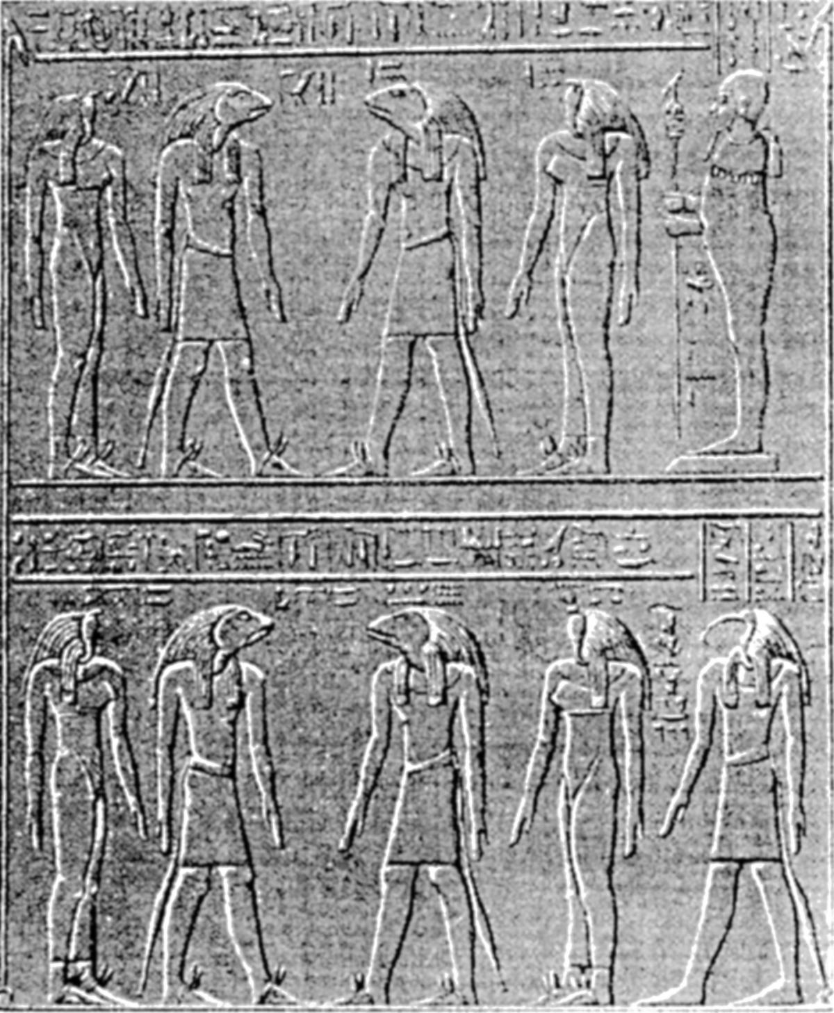 Ogdoad